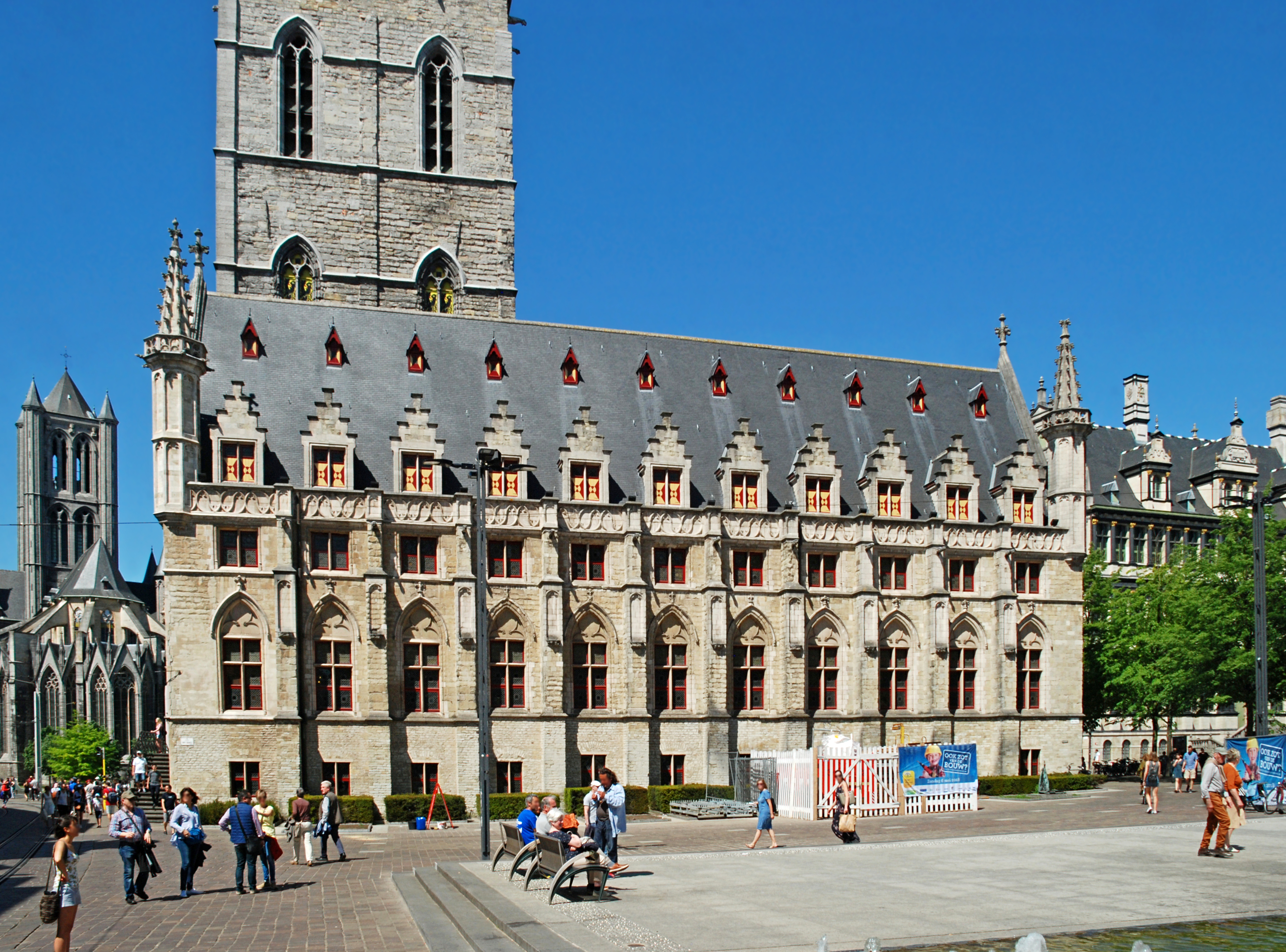 Belgique - Gand - Halle aux Draps (Lakenhalle, style gothique, 15e siècle)